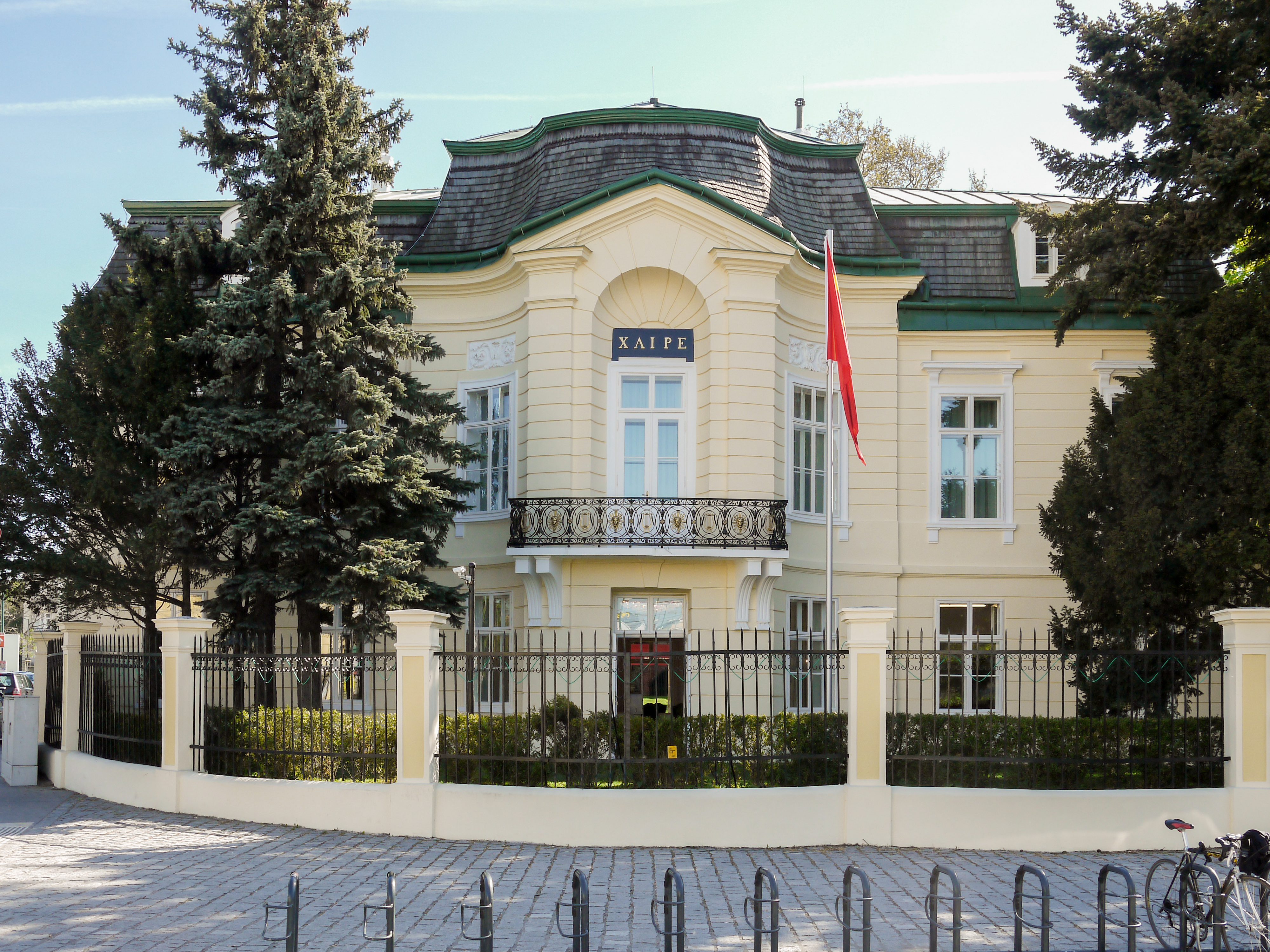 Villa Chaire